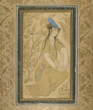 Girl by Reza Abbasi